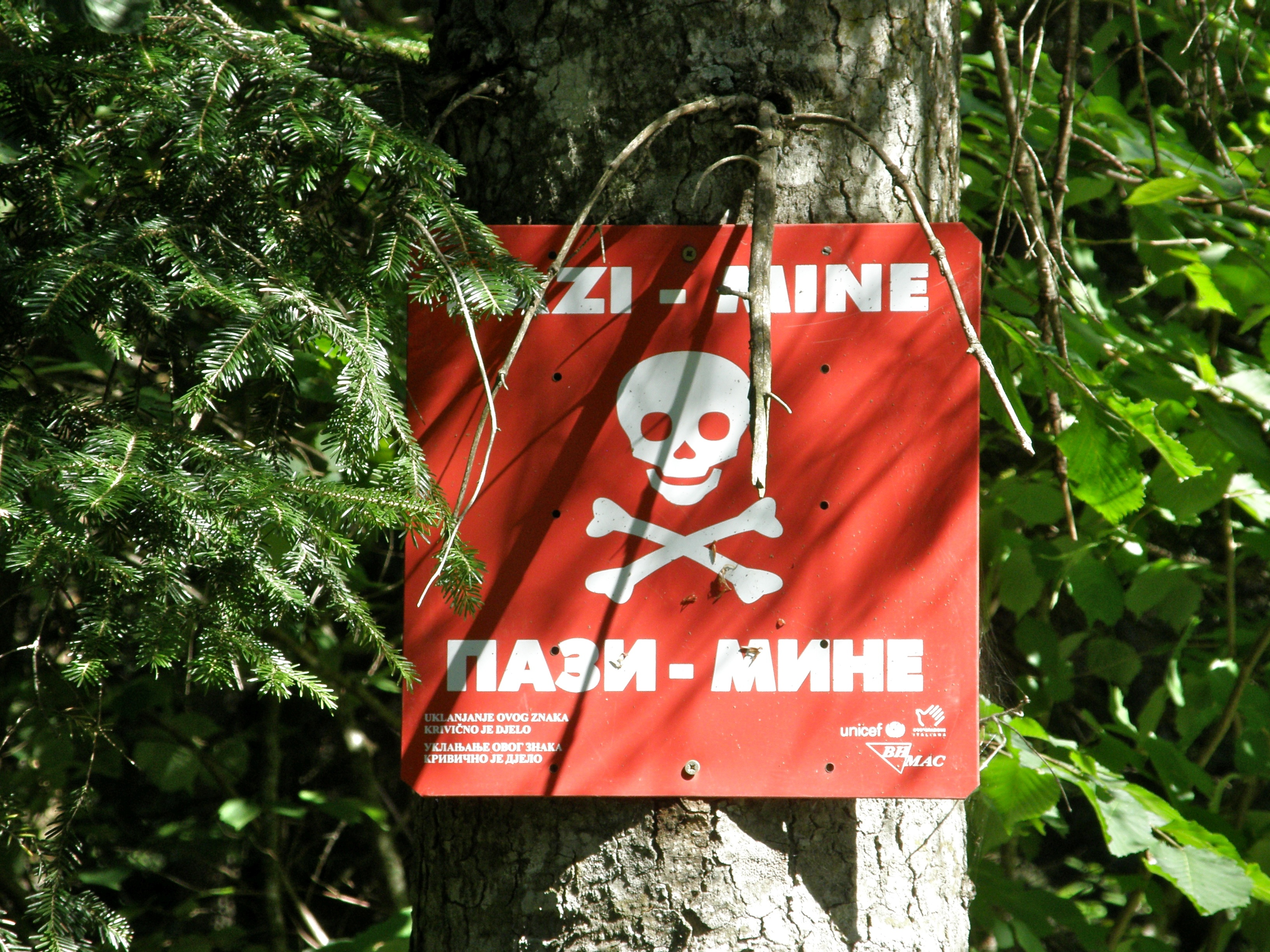 Landmines!